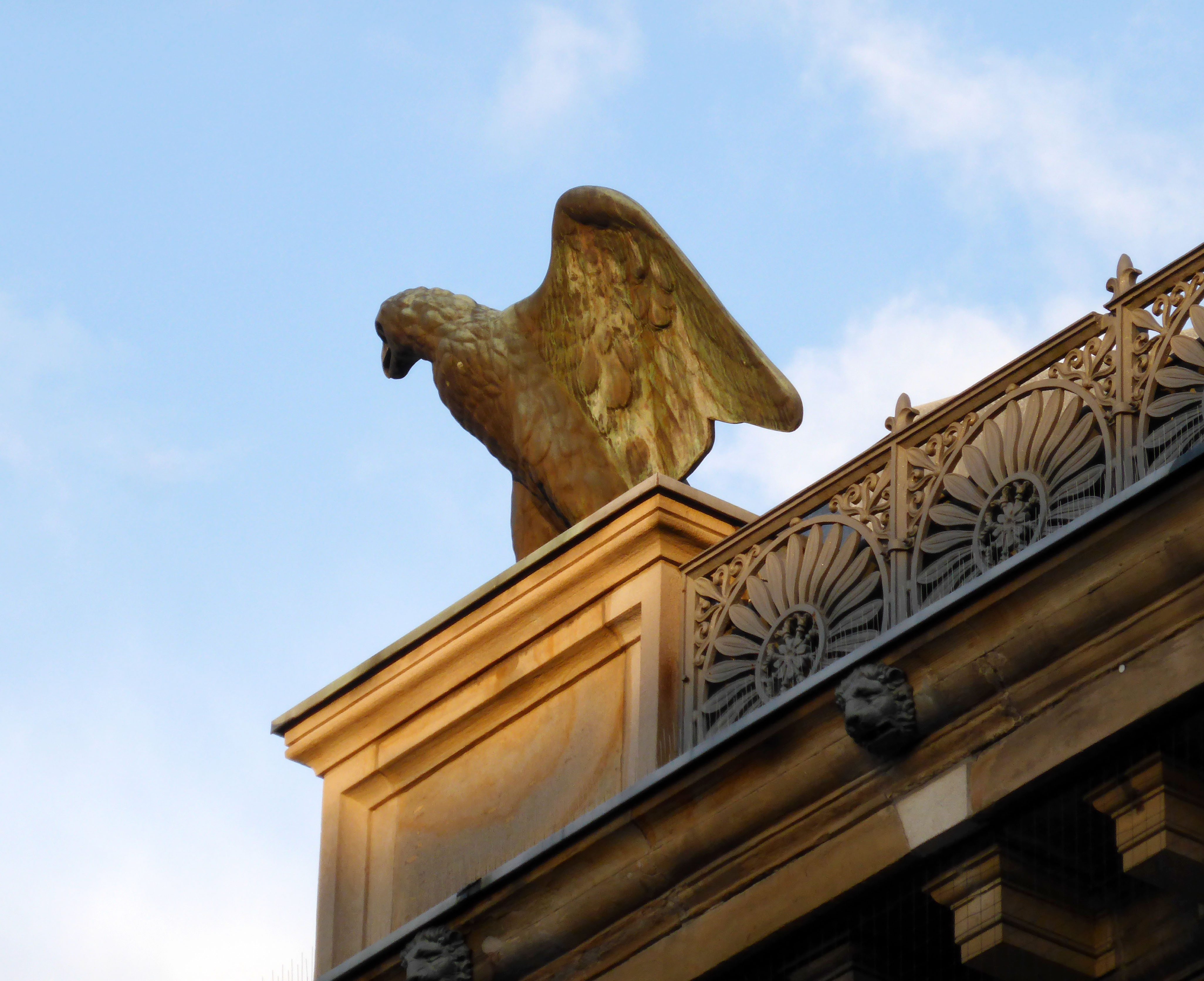 Bronze-Adler von Wilhelm Joseph Imhoff am Alten Elberfelder Rathaus dem heutigen Von der Heydt-Museum.